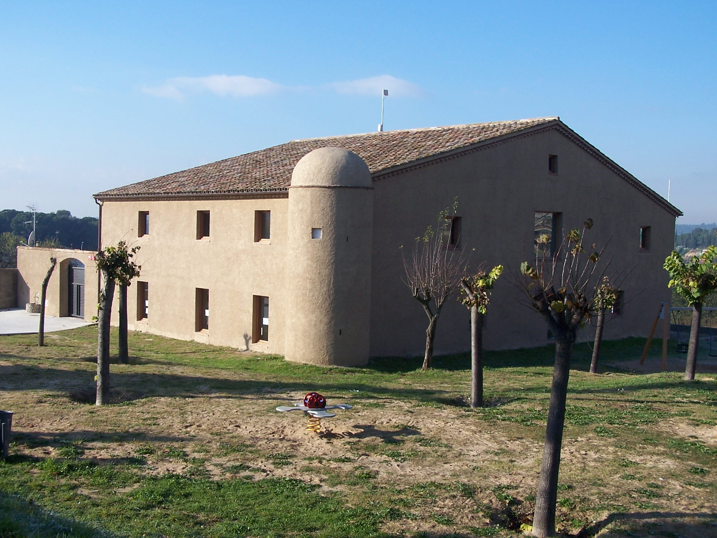 Façana de Can Magarola, Lliçà de Vall